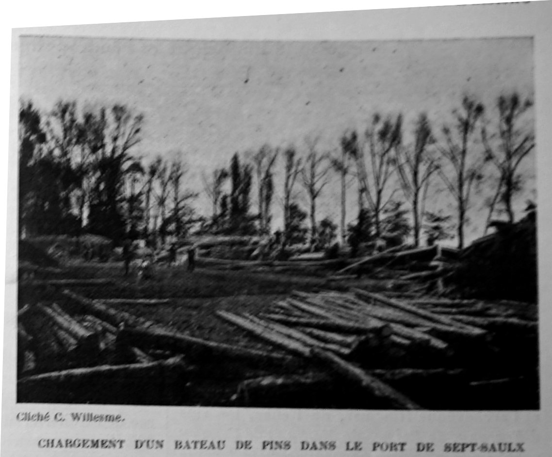 publié dans le "Bulletin de l'œuvre des voyages scolaires".